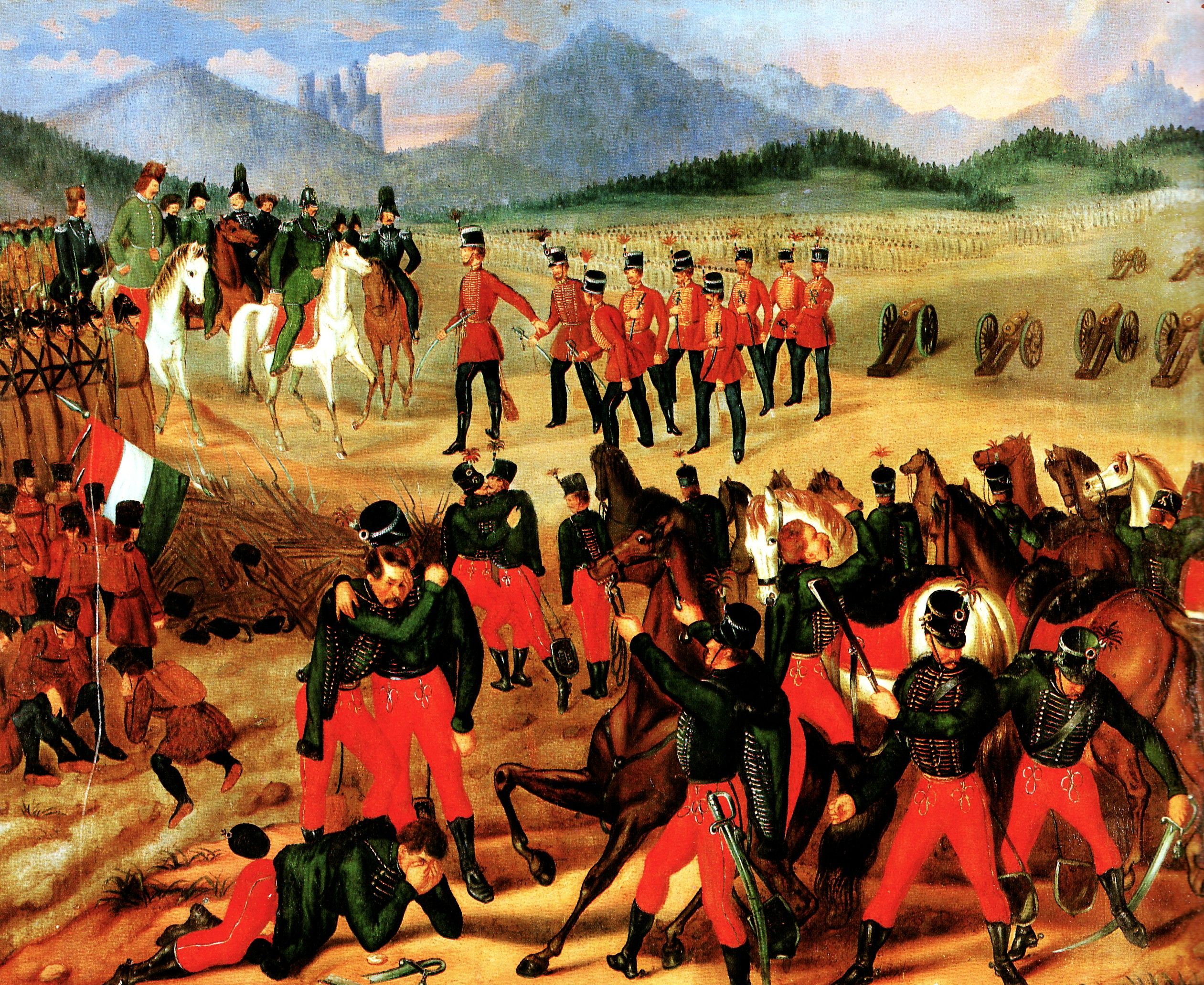 A világosi (szőlősi) fegyverletétel. Szkicsák-Klinovszky István festménye